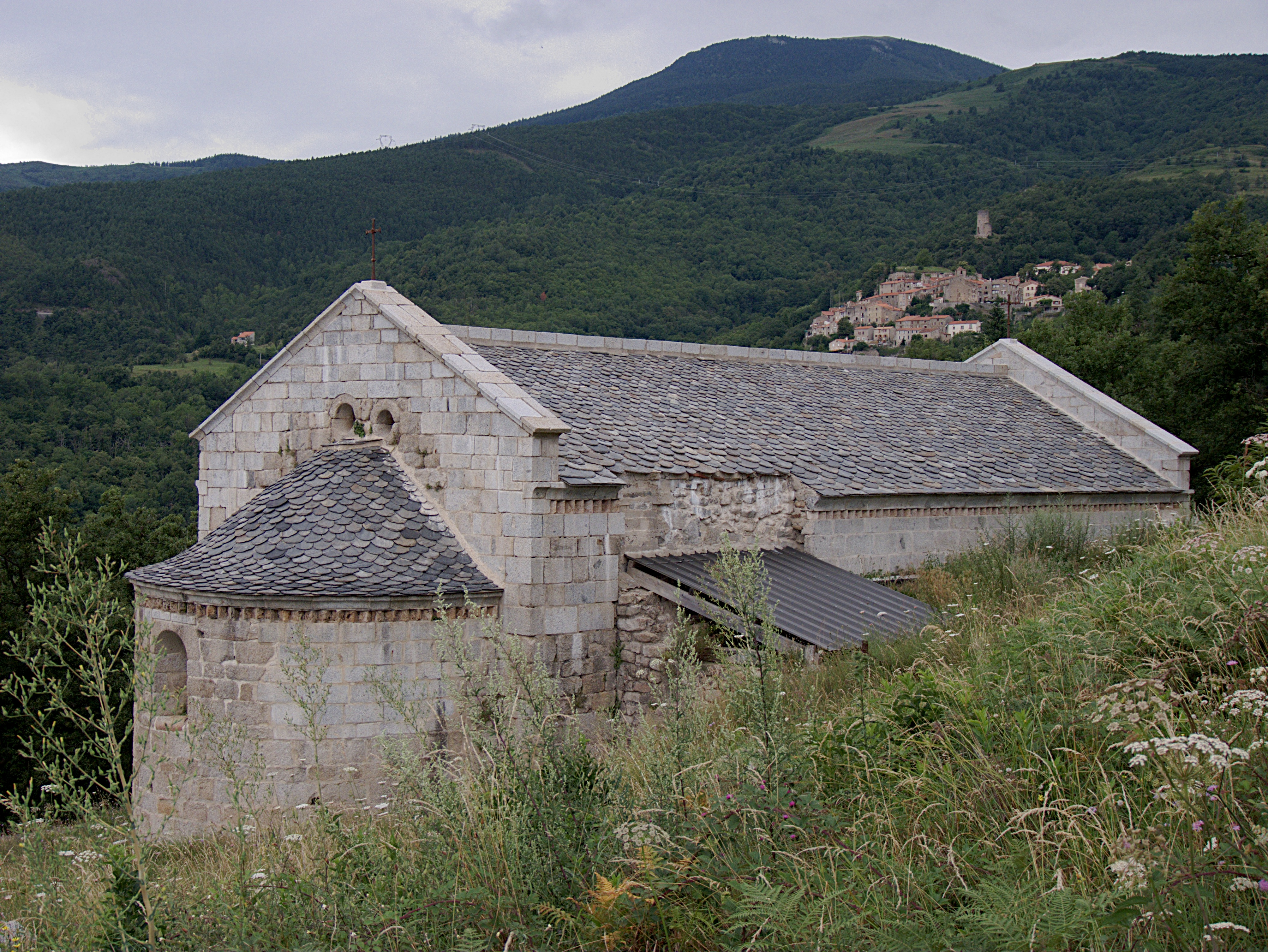 Vue de la façade nord, ancienne église Saint Martin (12e siècle), Corsavy (Pyrénées-Orientales, Languedoc-Roussillon, France)